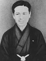 portret van Chiba Takusaburō